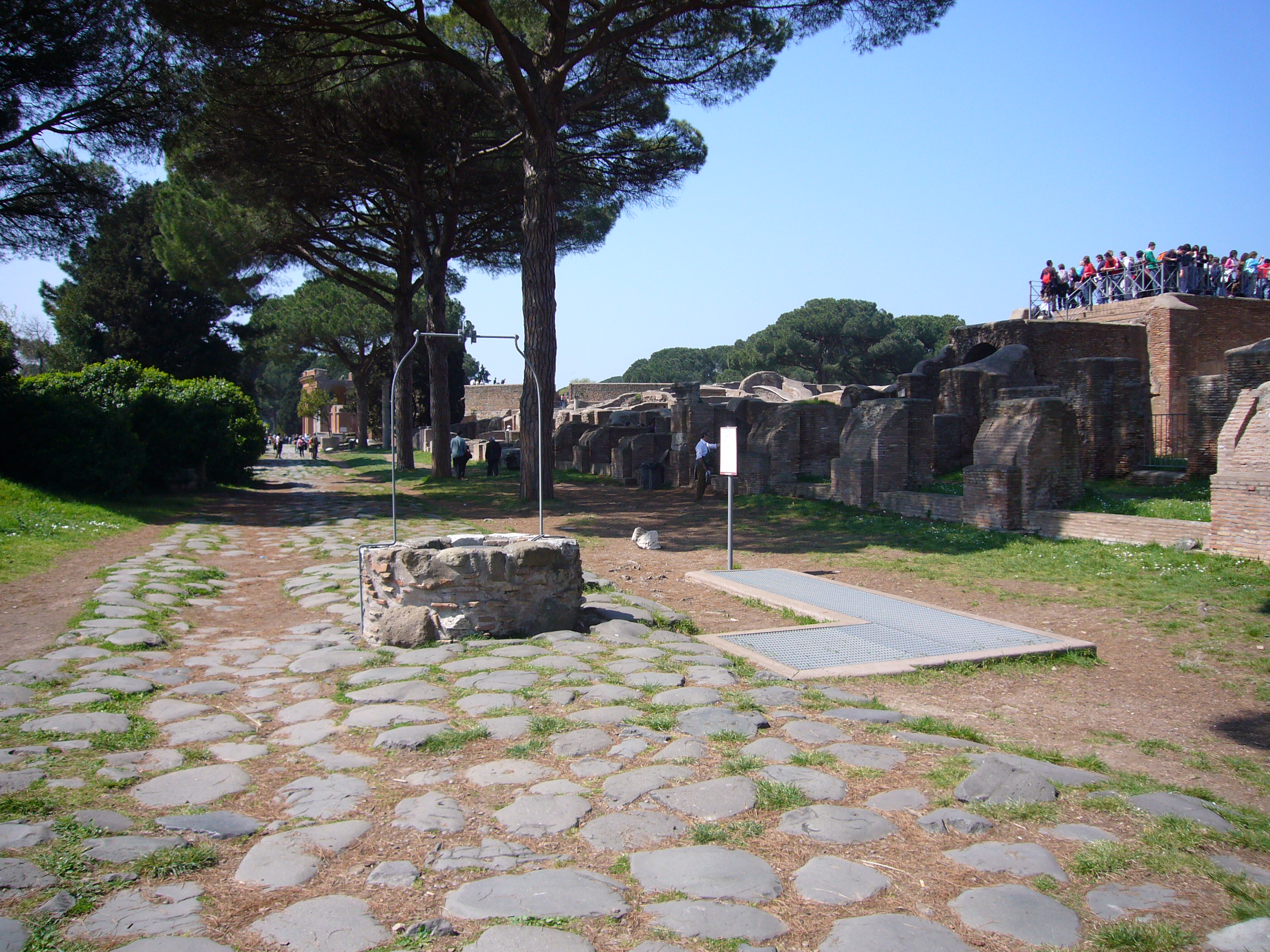 Ostia antica (Roma): pozzo di VI sec. scavato al centro del decumano